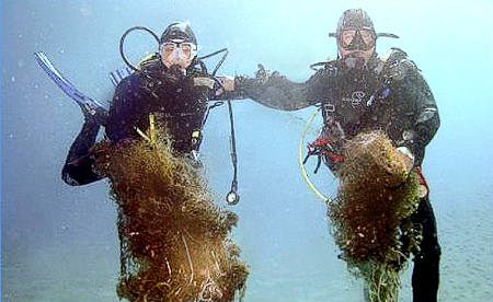 Retirada de red peligrosa abandonada en Torremolinos